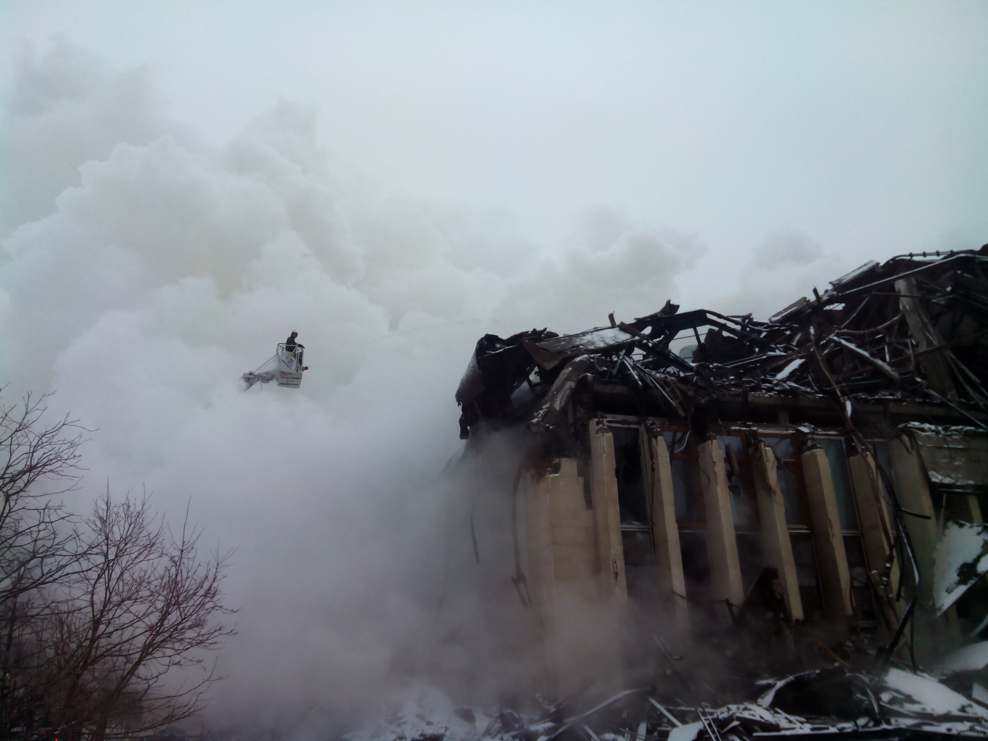 31 января 2015 г. Тушение пожара — ИНИОН РАН